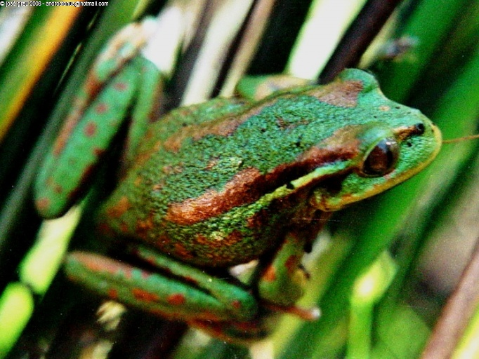 Sapito selvático (Hylorina sylvatica).